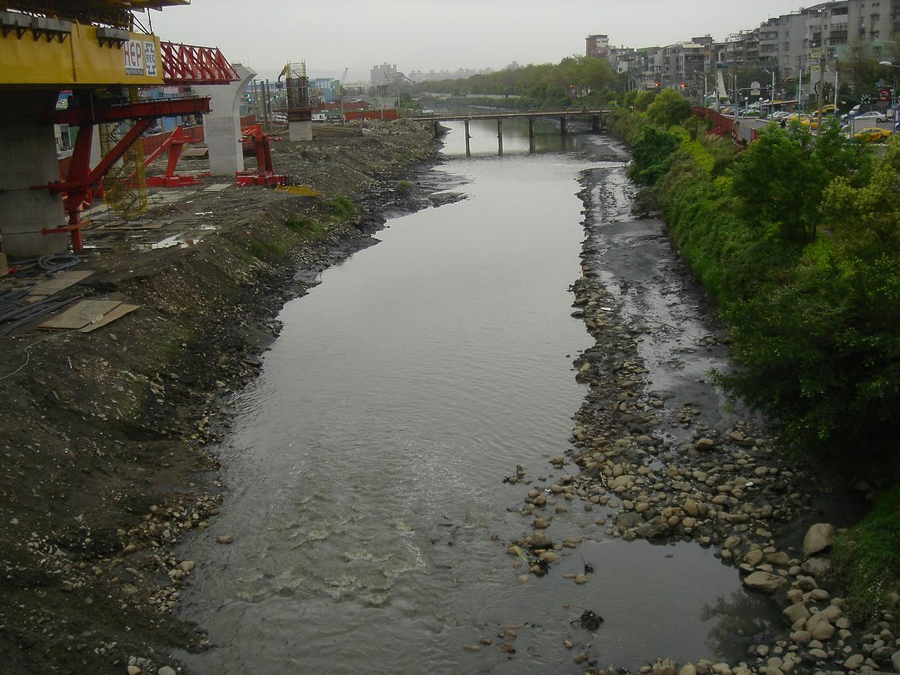 臺北縣板橋市湳仔溝與西側建設中的臺65線高架快速道路。